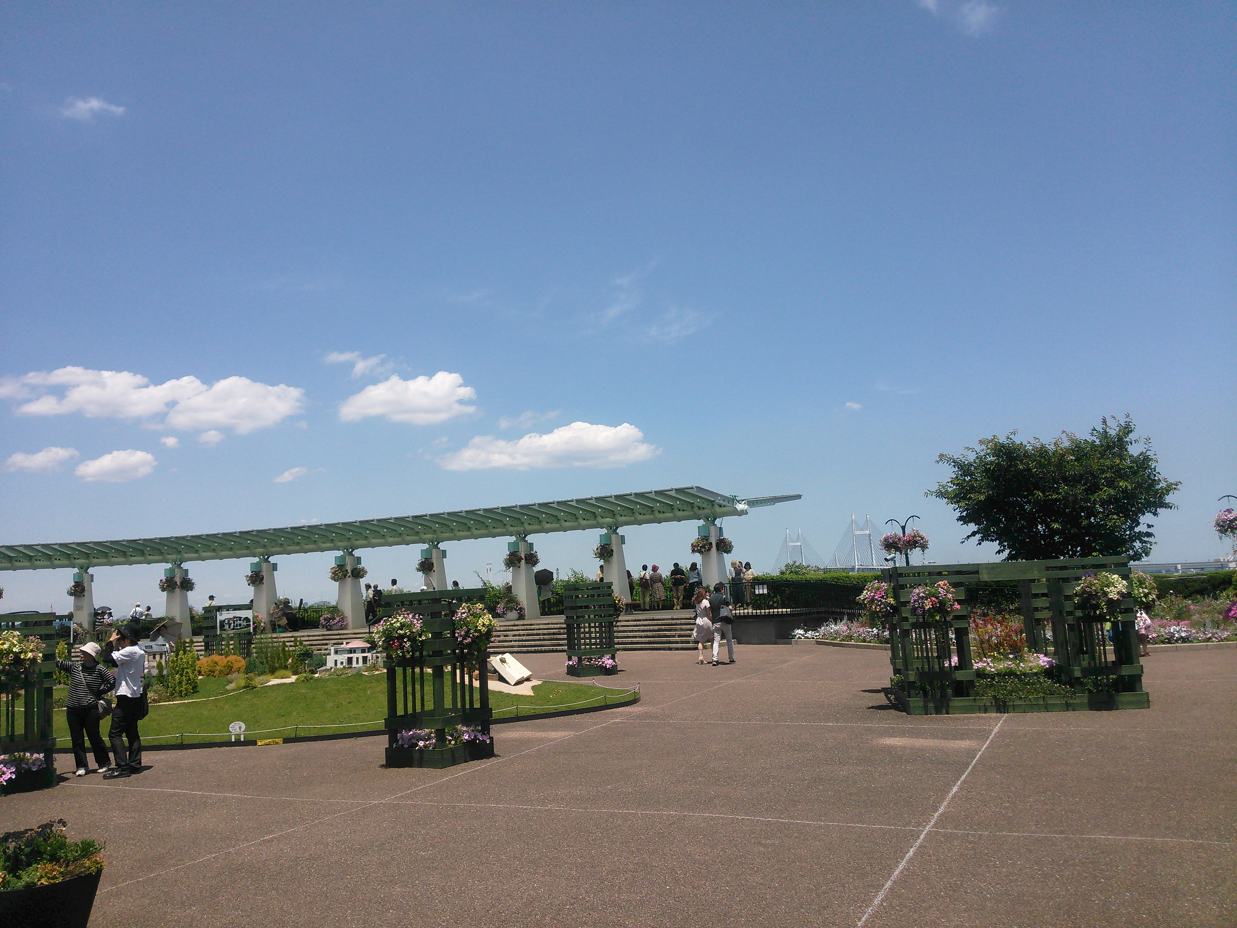 2017年、第33回全国都市緑化よこはまフェア開催中の港の見える丘公園。右奥は横浜ベイブリッジ。